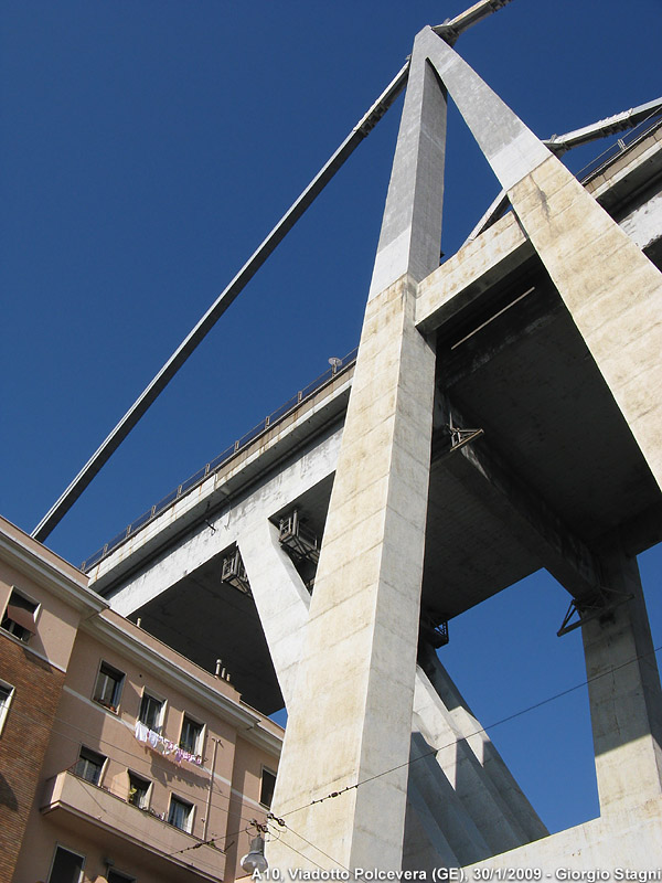 Genova, il viadotto Polcevera sopra le case di via Fillak.